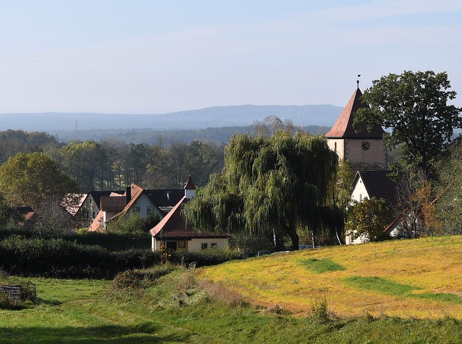 Blick auf Entenberg aus nordwestlicher Richtung